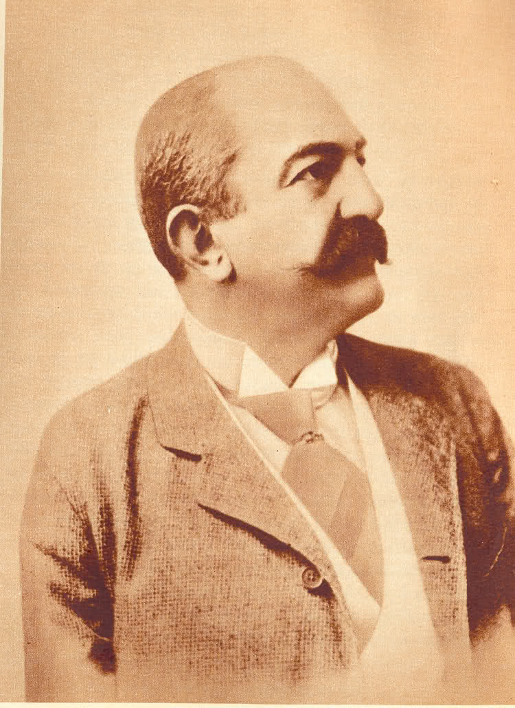 Kralj Milan I Obrenović, prvi kralj Srbije posle kosovskog boja, Naslednik kneza Mihajla Obrenovića i otac kralja Aleksandra Obrenovića